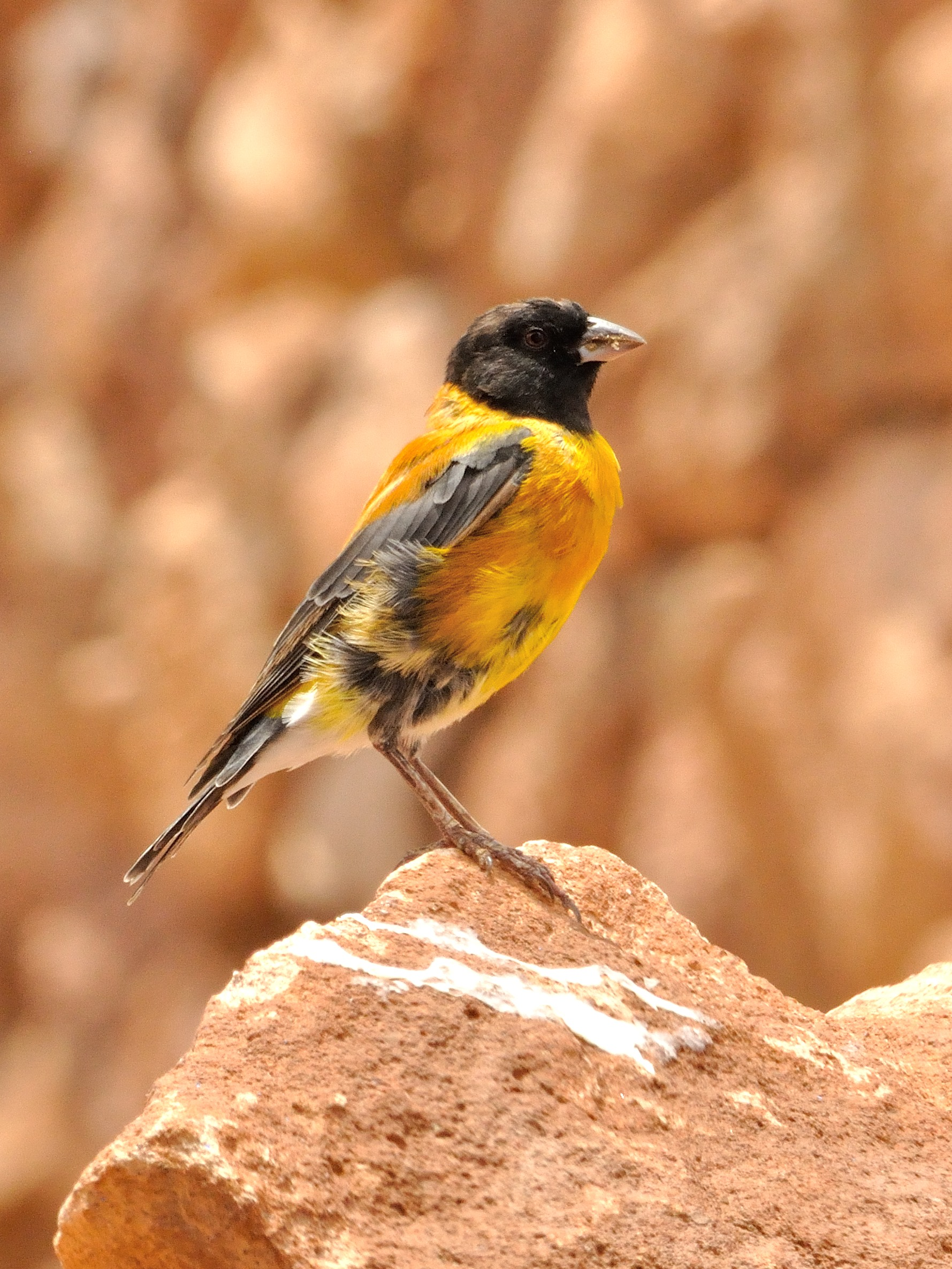 Cometocino del Norte, Quebrada Guatín, 07feb13